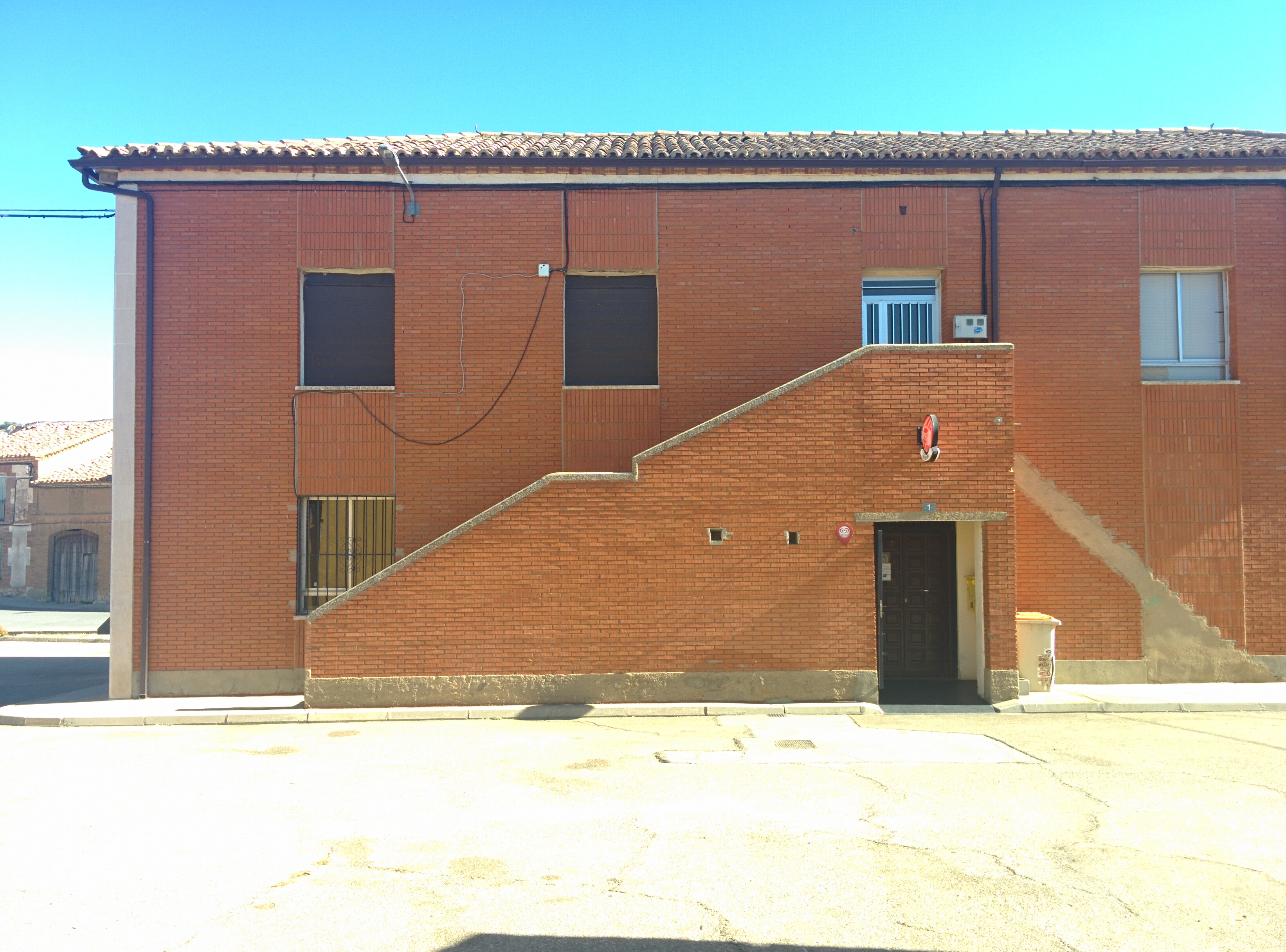 Casa consistorial de Villardefrades (Valladolid, España).